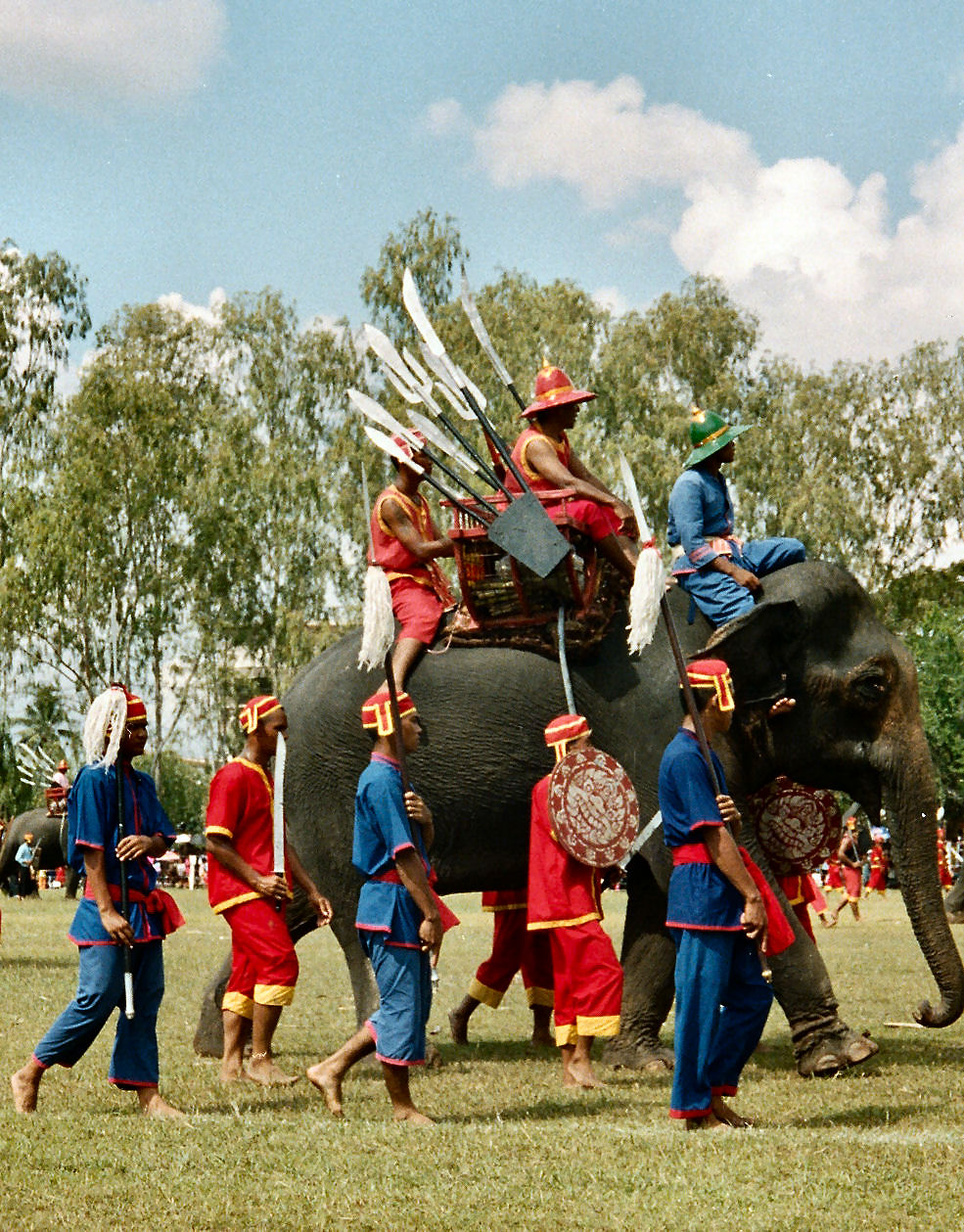 Demonstratie veldslag met gevechtsolifanten Olifantenfestival Surin 16.11.2002 Zelf met eigen digitale camera gemaakte opname.